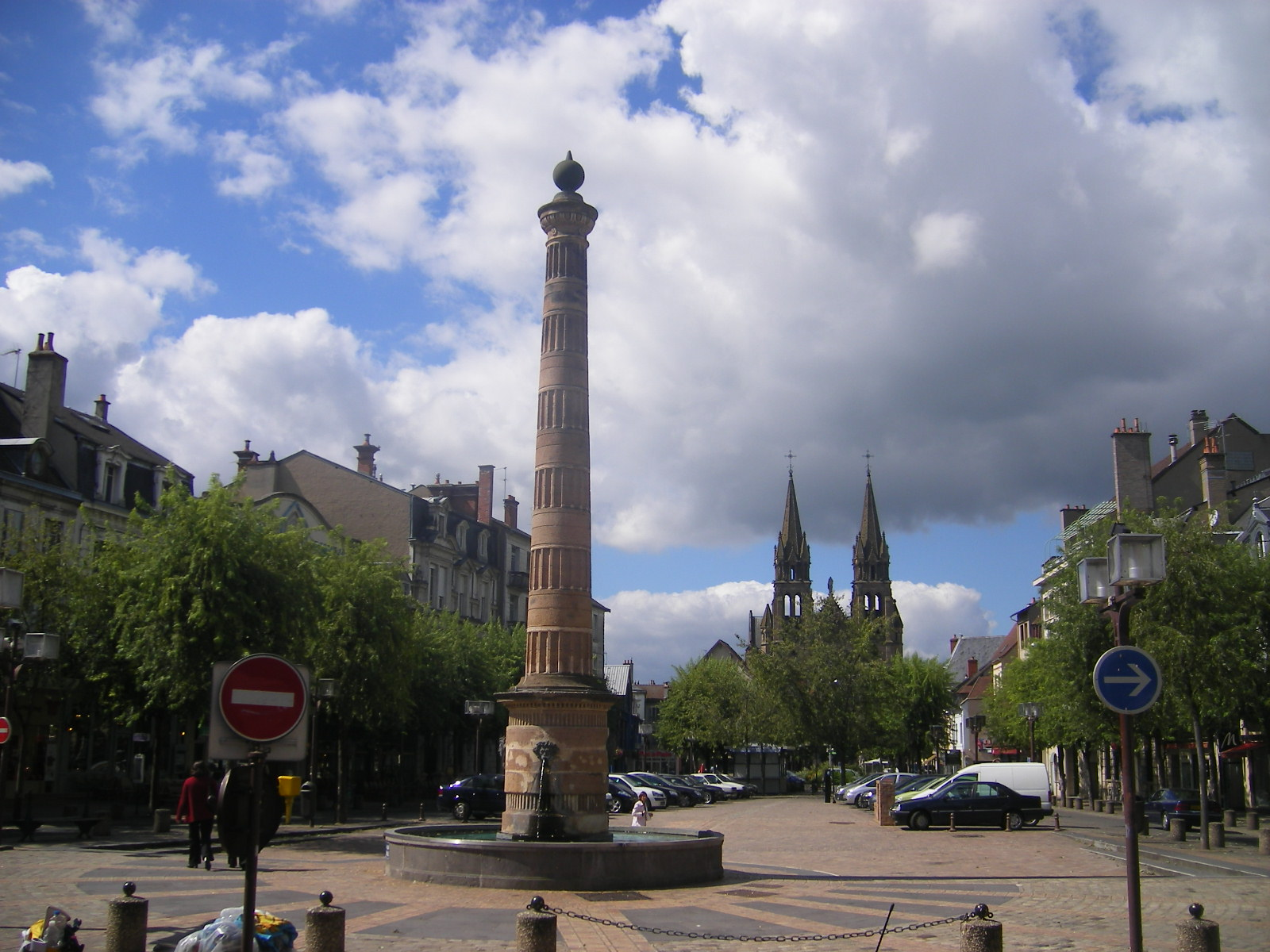 Moulins